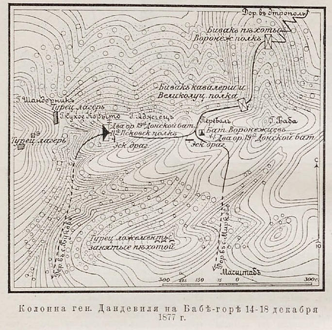 Данное изображение было использовано в статье «Баба-гора» опубликованной в четвёртом томе «Военной энциклопедии», который был издан книгоиздательским товариществом Ивана Дмитриевича Сытина в 1911 году в столице Российской империи городе Санкт-Петербурге.